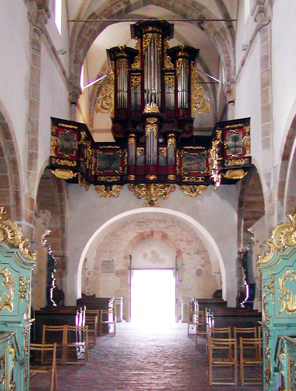 Sulejów Monastery Organy w kościele cysterskim w Sulejowie